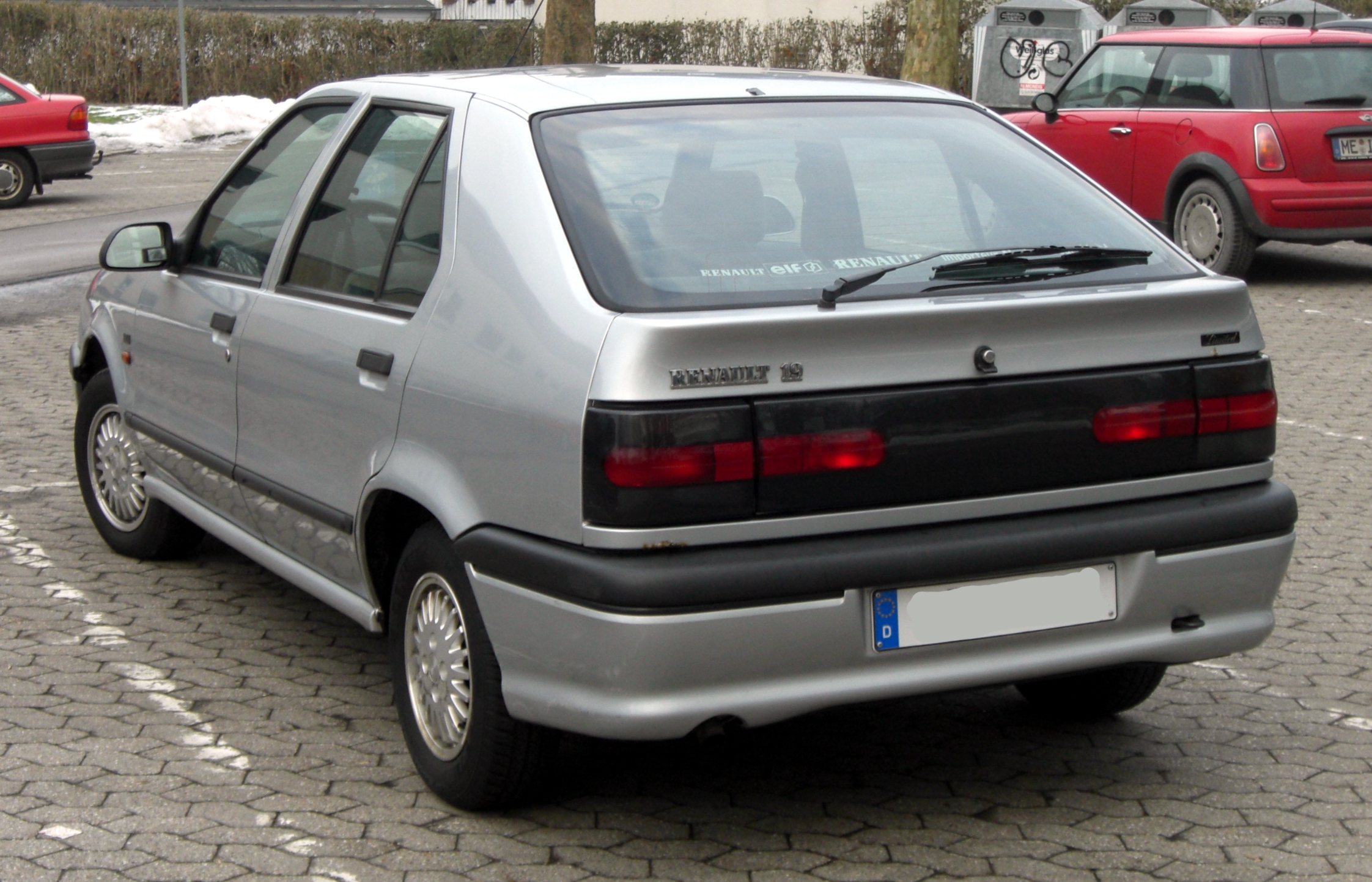 Renault 19 "Limited"